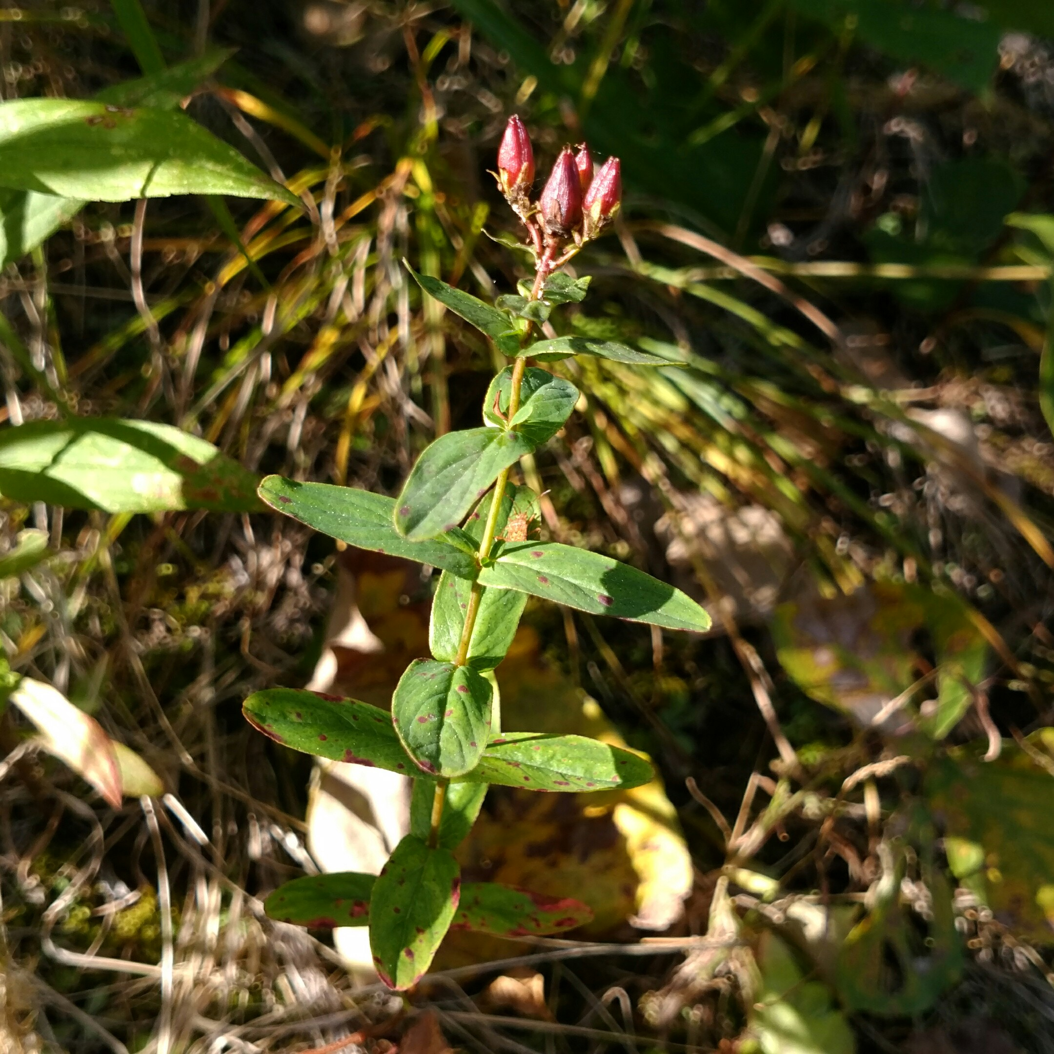 結実時のオトギリソウ。葉に和名の由来となった鮮紅色の斑点があらわれている。